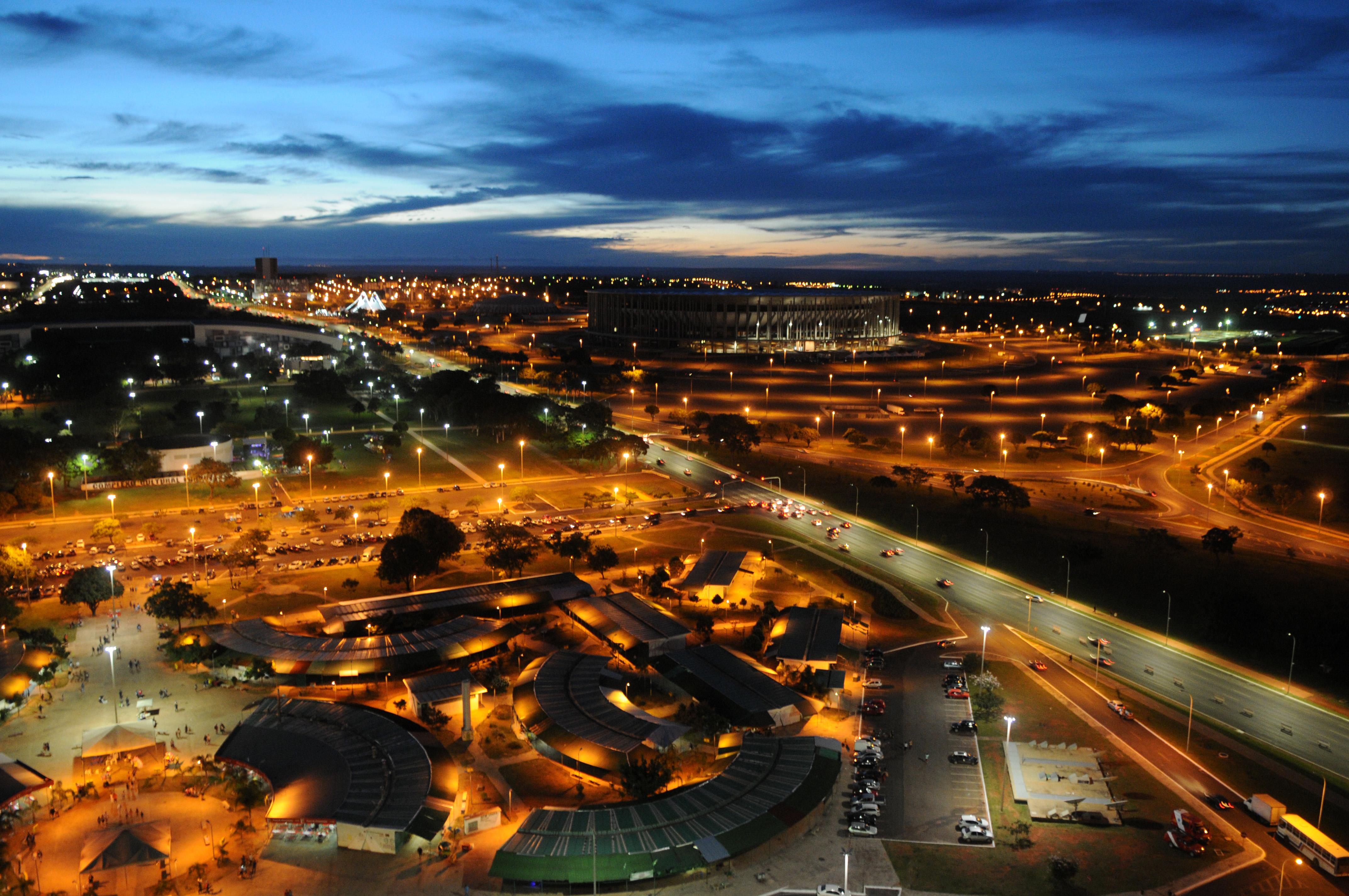 Brasília, DF, Brasil 21/4/2017 Foto: Gabriel Jabur/Agência Brasília. Visto do mirante da Torre de TV, a Feira da Torre e o Estádio Mané Garrincha.